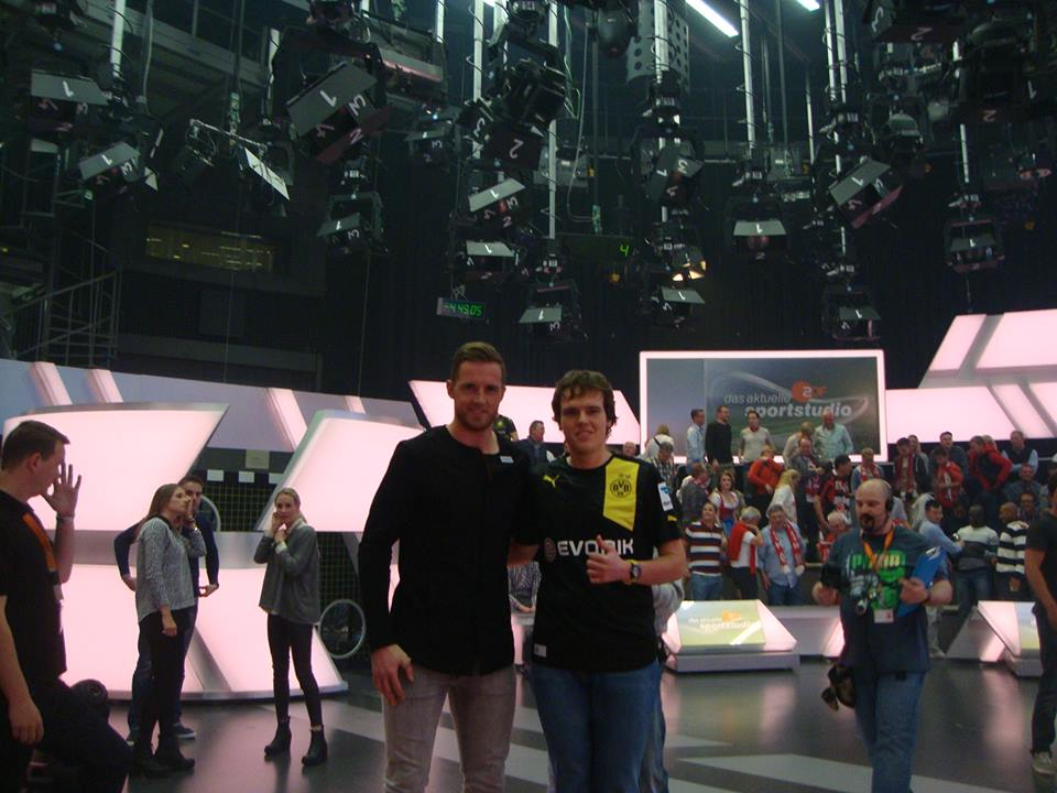 Ralf Fährmann und Christopher Frick